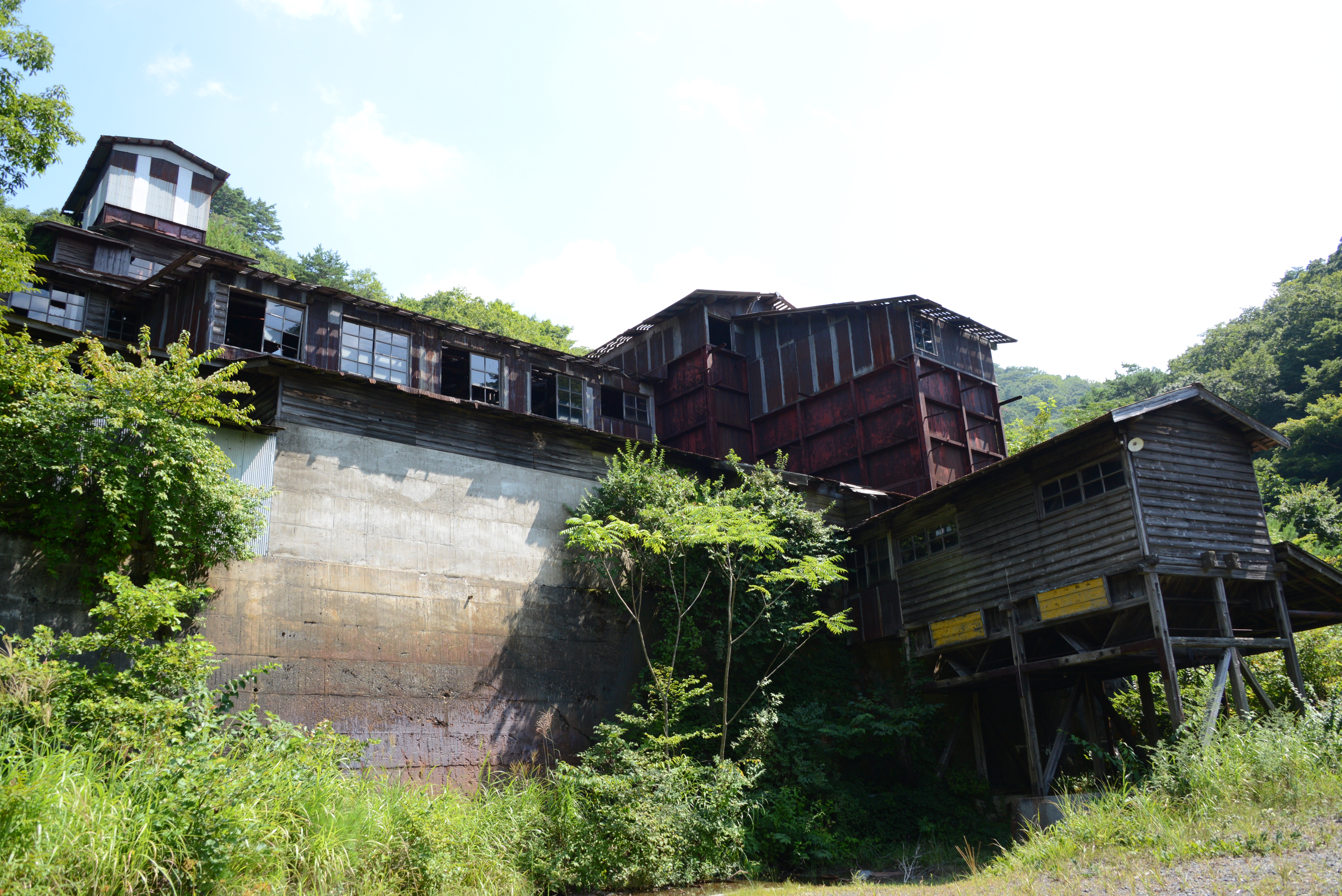 若松鉱山の外観です